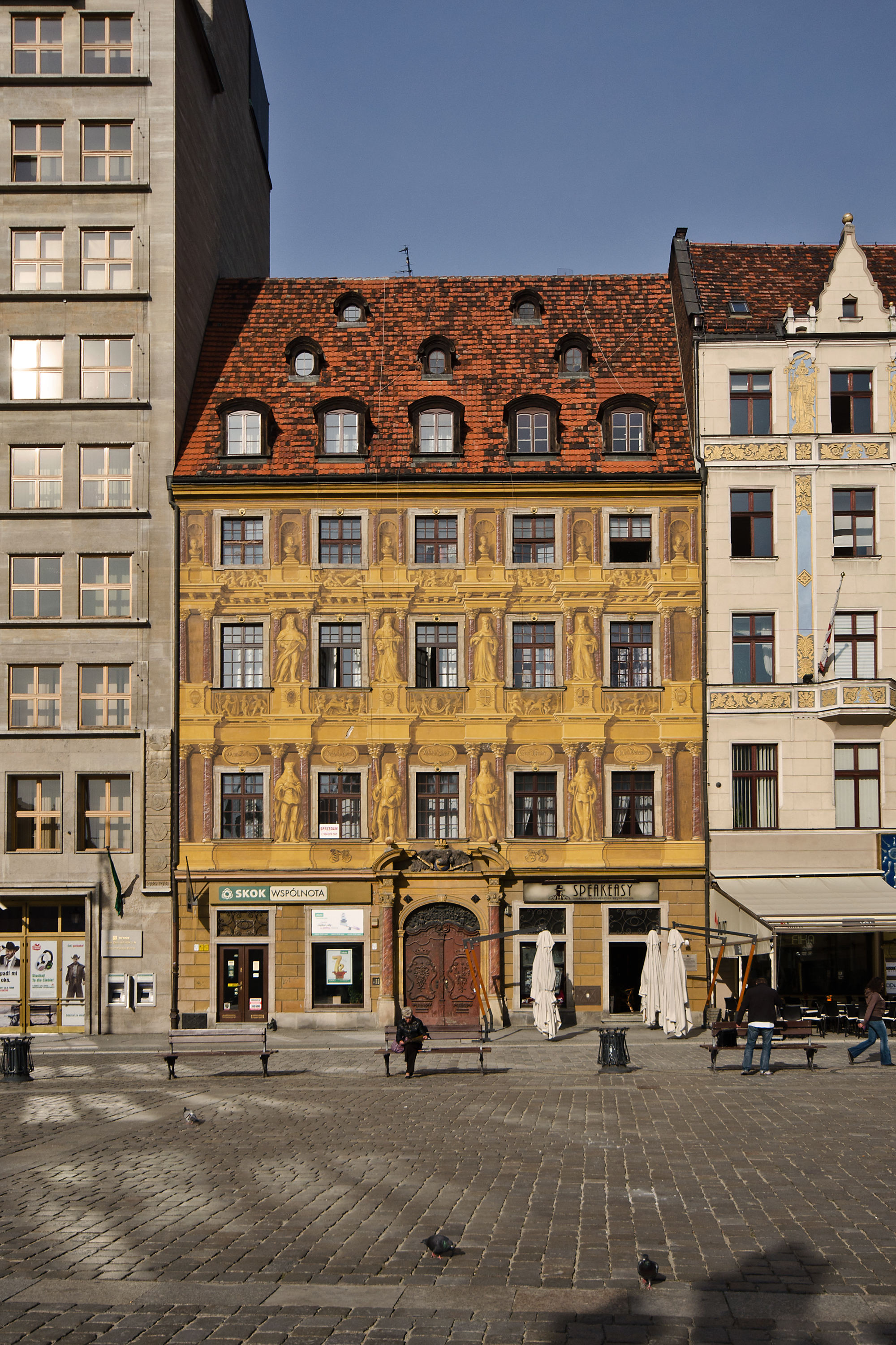 Kamienica Pod Siedmioma Elektorami Rynek 8, Miasto Wrocław - Stare Miasto